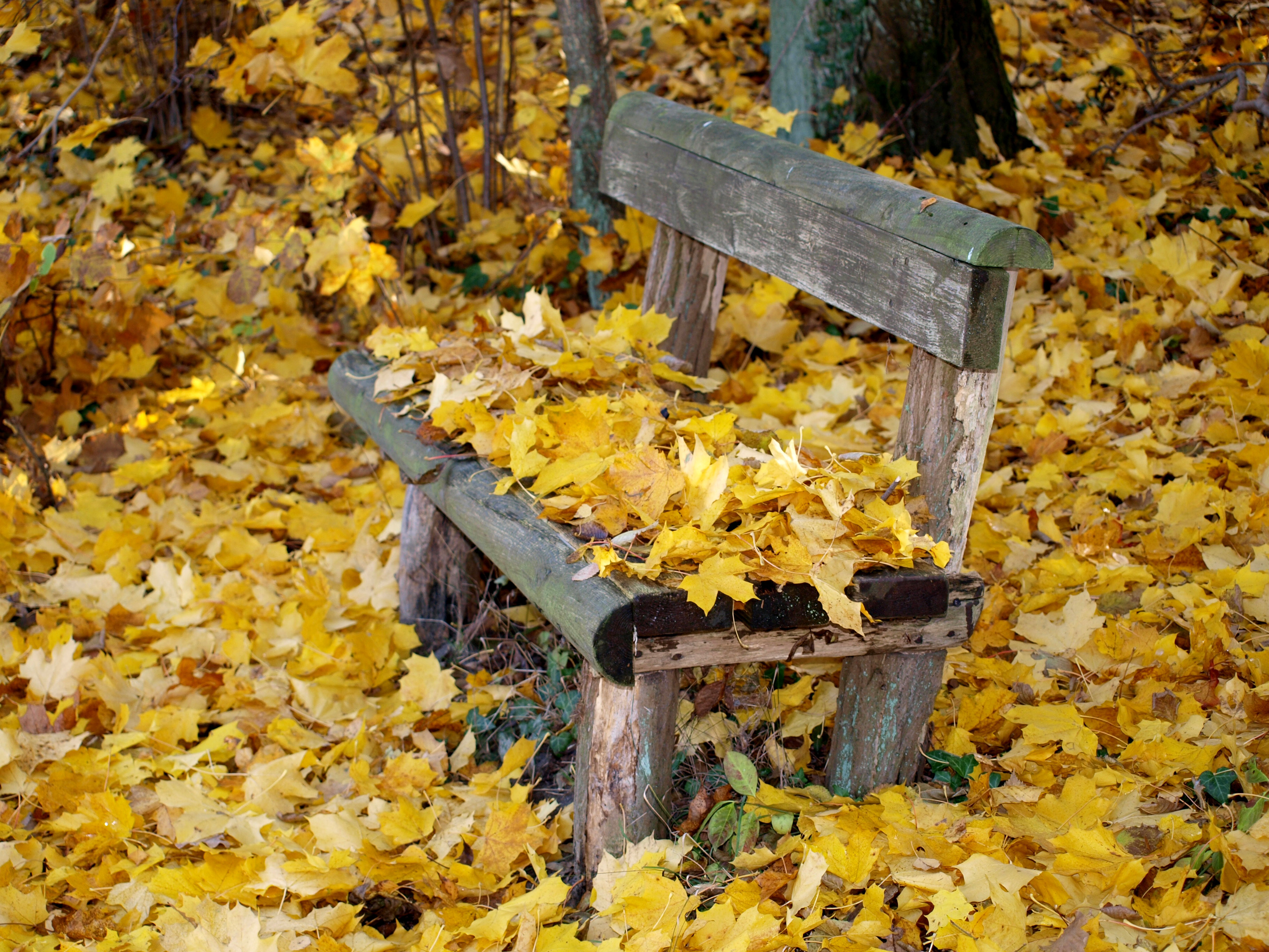 Herbstlaub